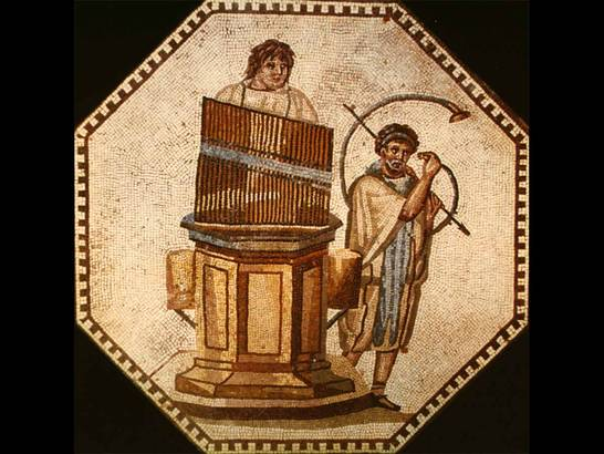 Римские музыканты, играющие на гидравлосе (водяном органе) и G-образном роге. Мозаика в римской вилле Ненниг (под Триром), II в. н.э.